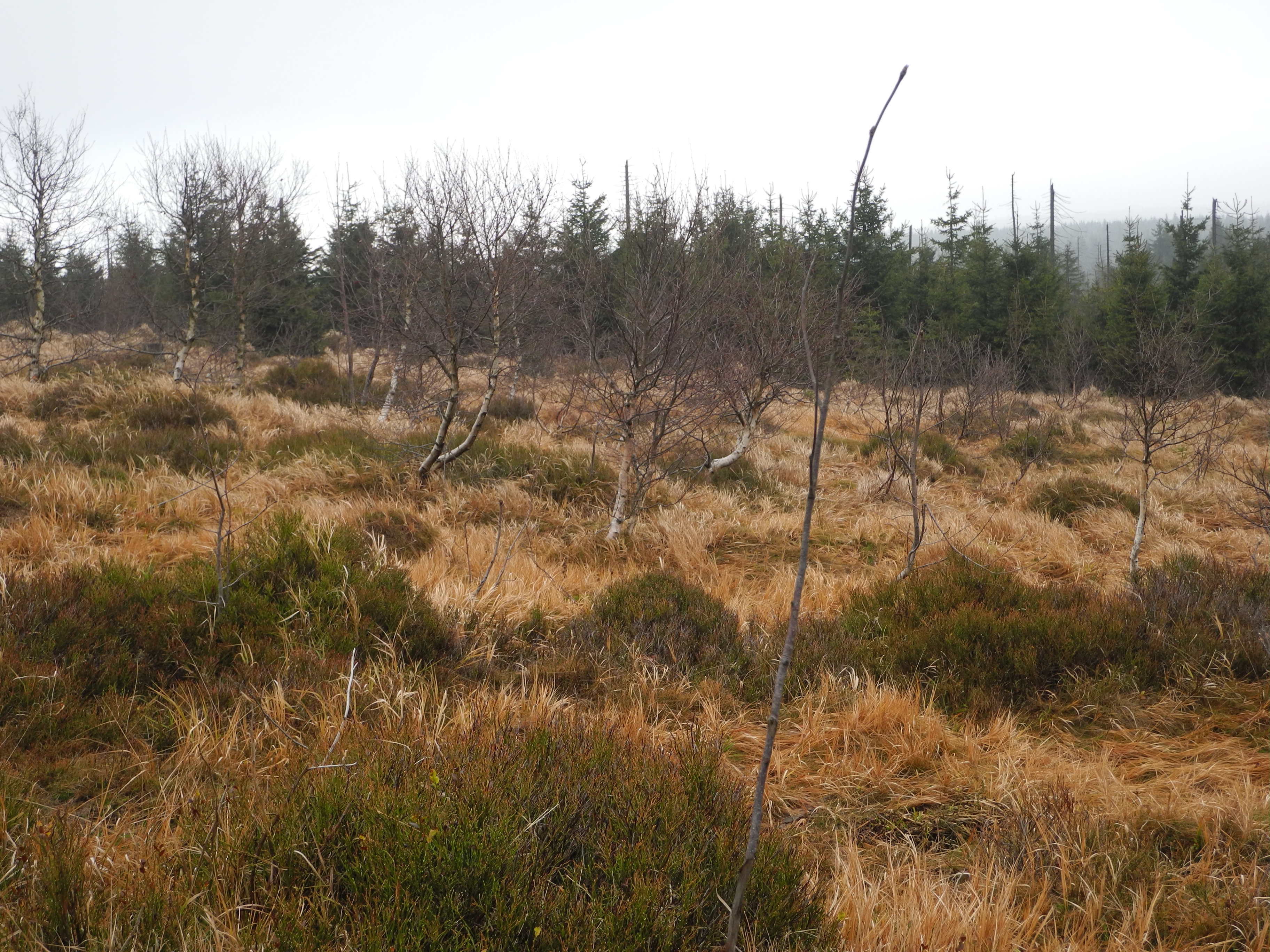 Pohled z cesty vedoucí na Rozmezí